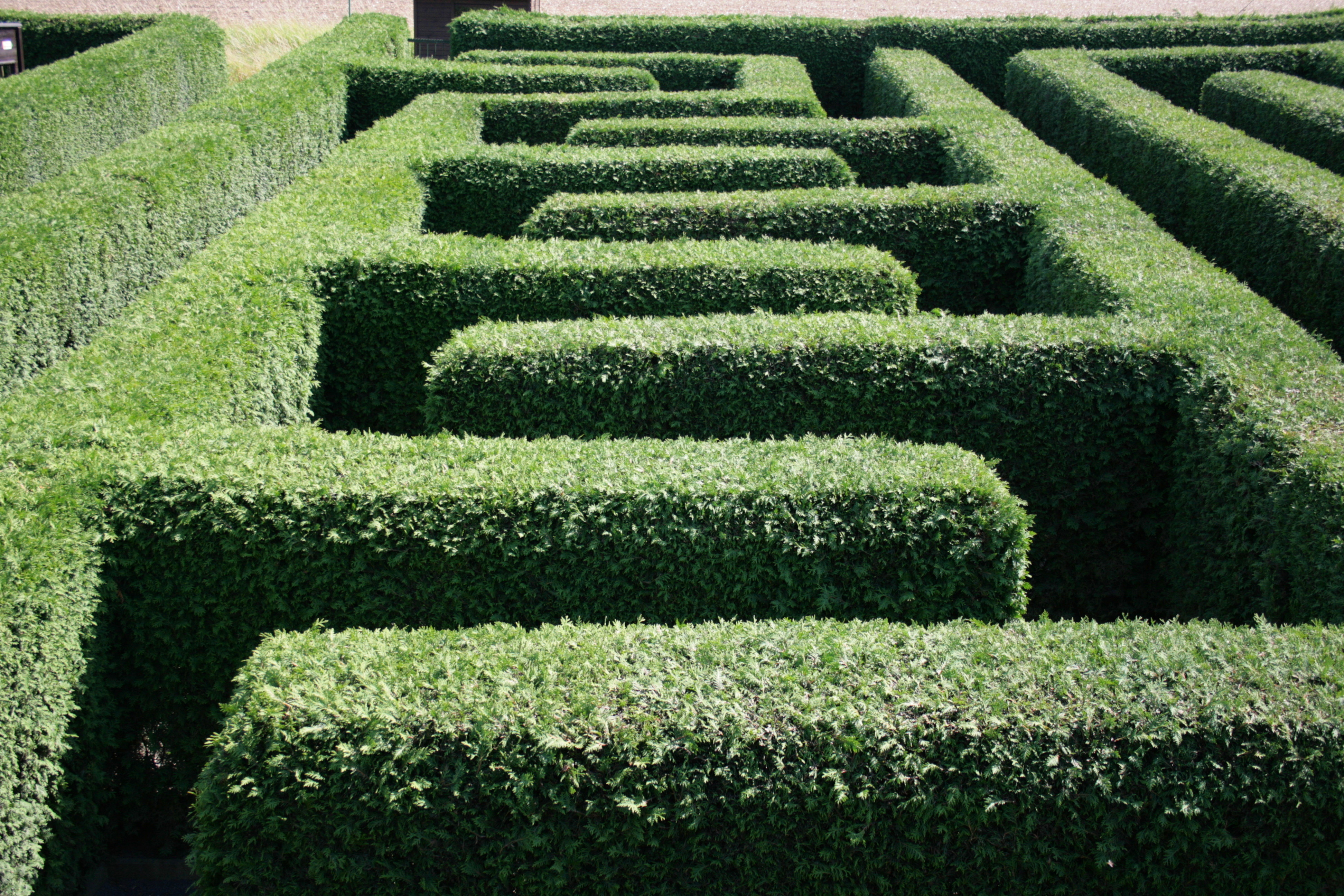 Irrgarten in Bautzen-Kleinwelka Hornjoserbsce: W Małowjelkowskim błudnišću